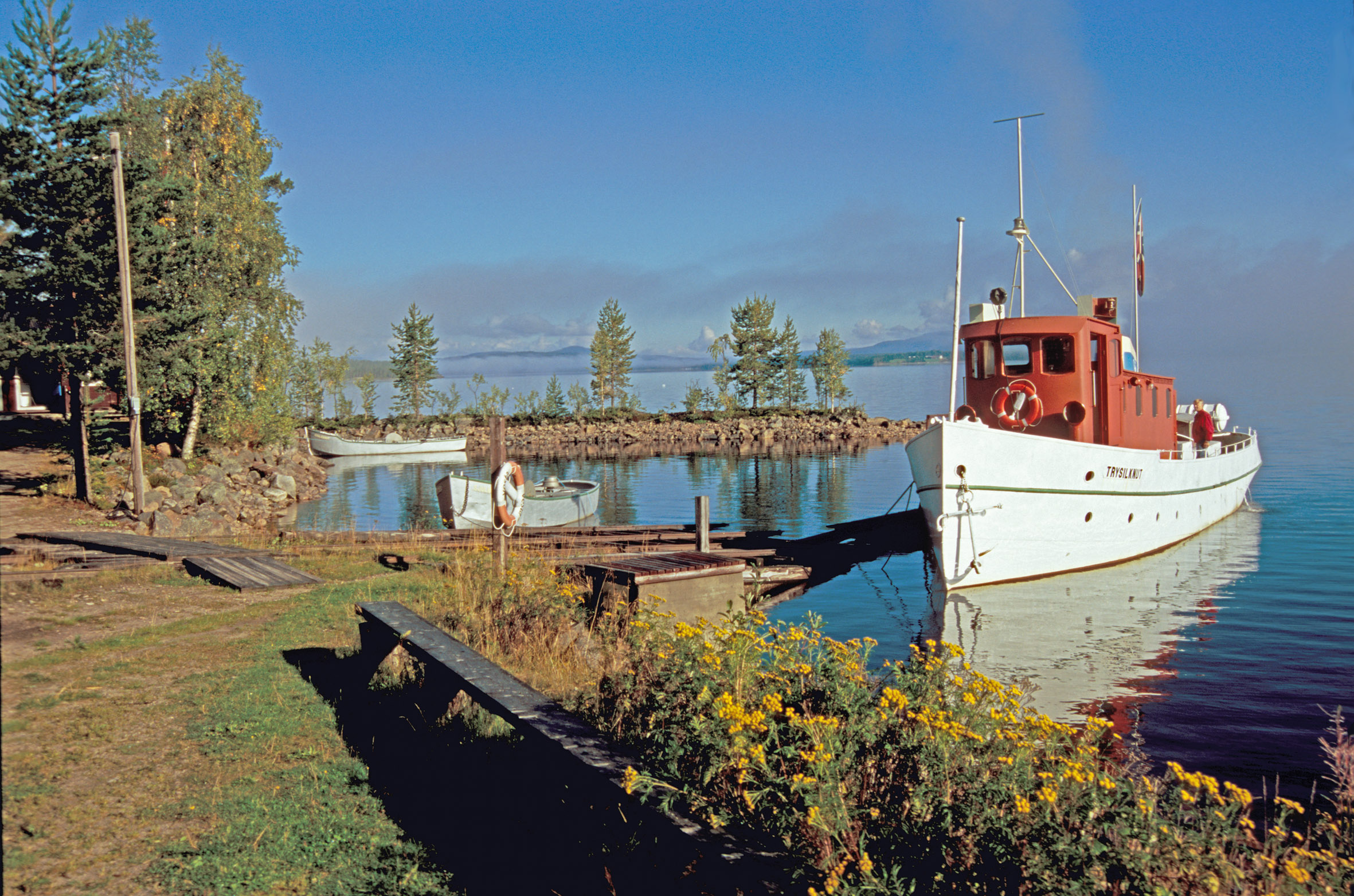 Den gamle slepebåten M/S Trysilknut utenfor Sørlistøa Fløtermuseum